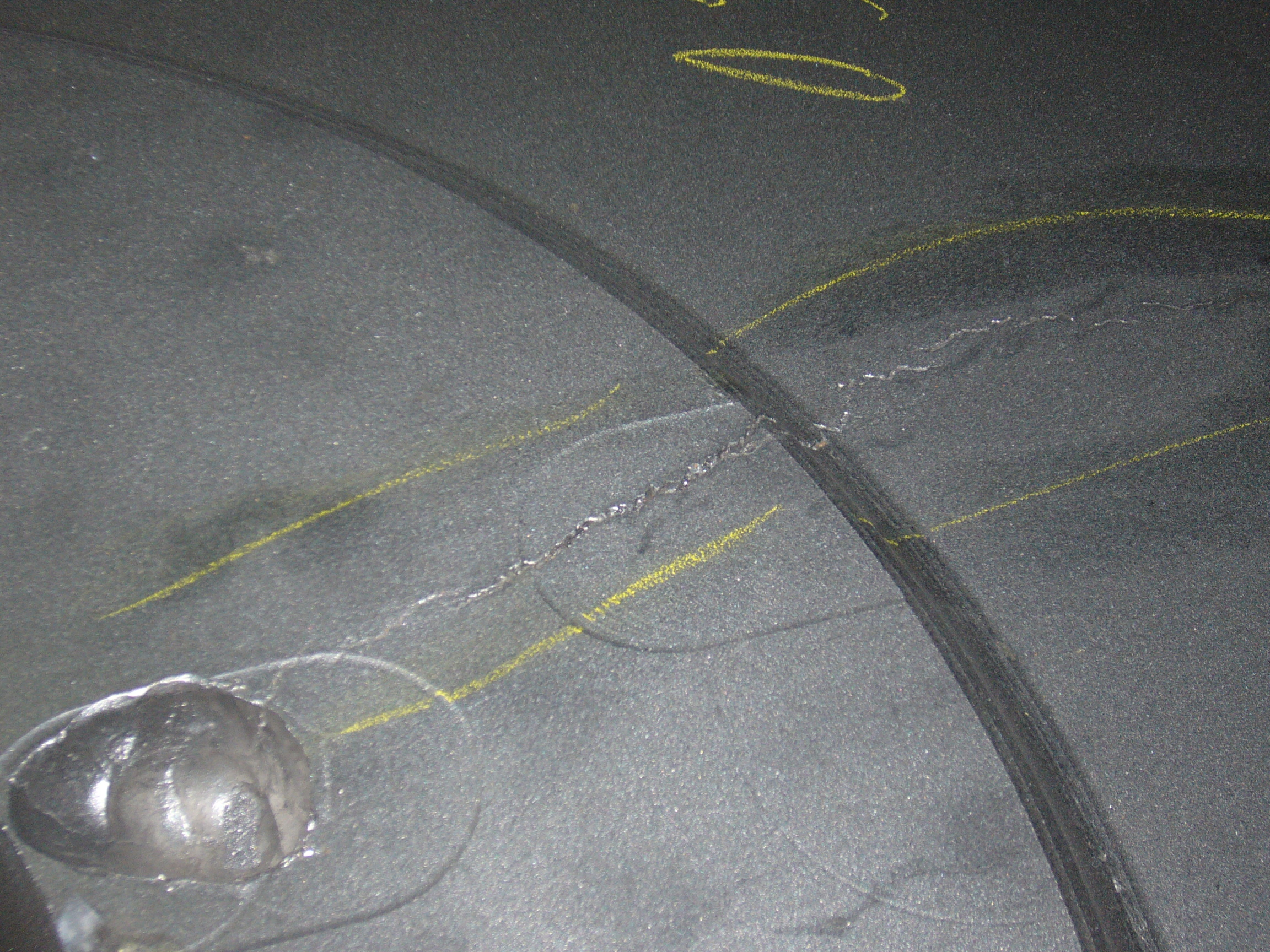 Warmriss